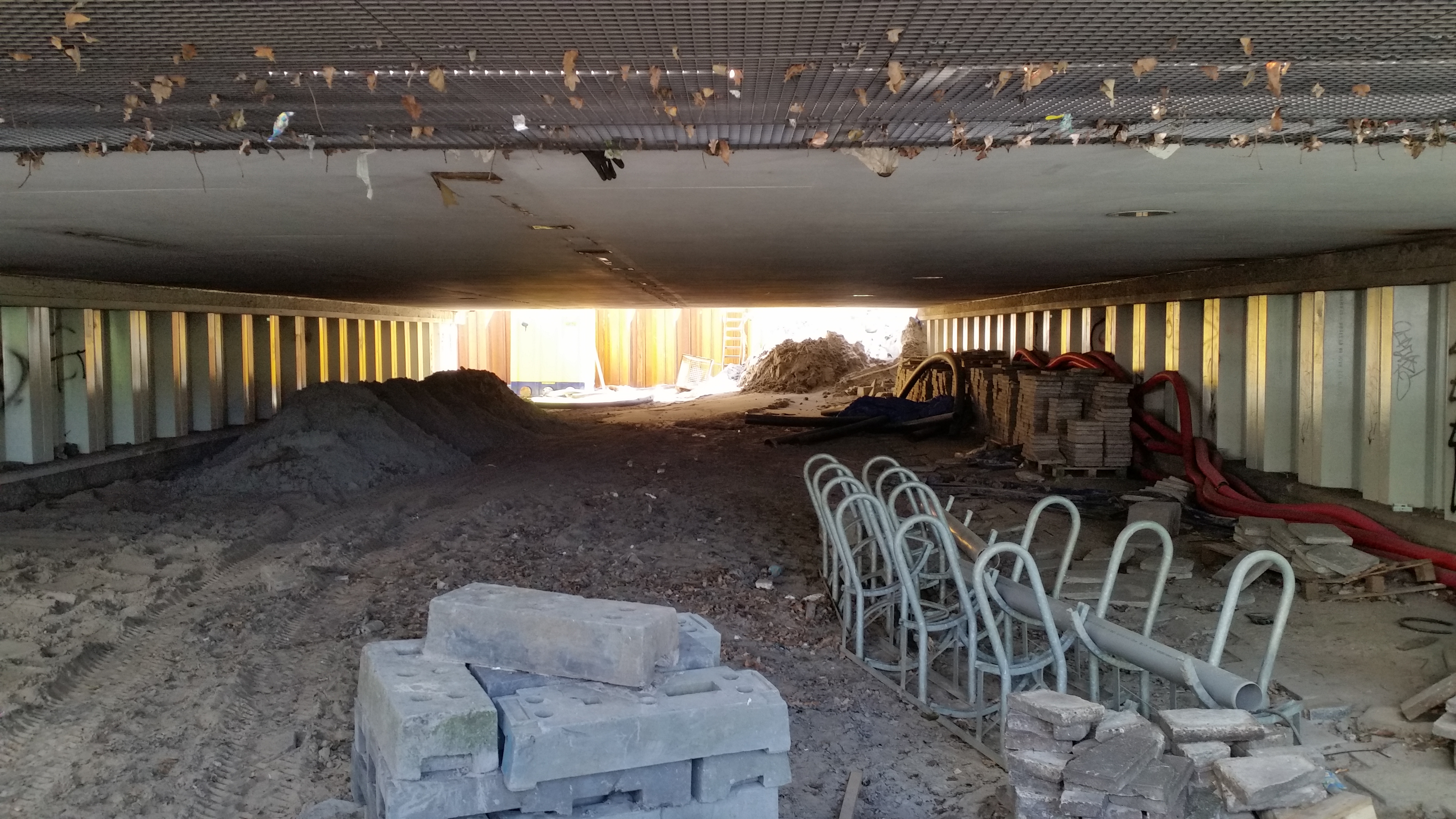 Afgesloten Brug 860 (in Amsterdam)